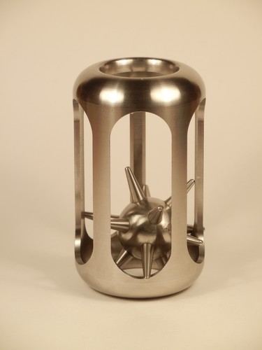 Ježek v kleci ORIGINAL z nerezi